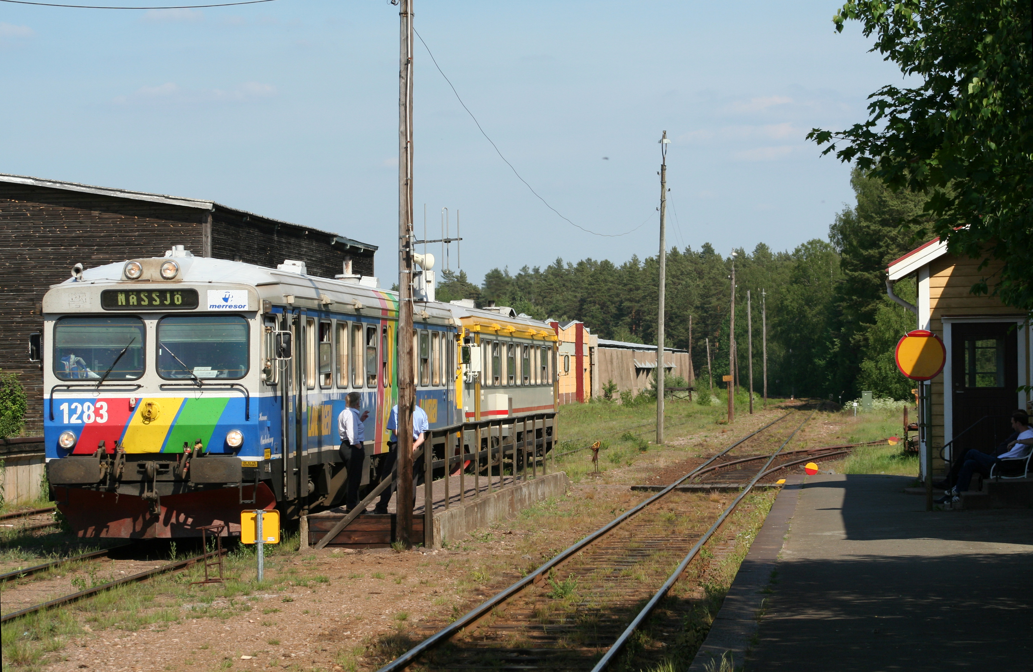 Två motorvagnar inväntar ett mötande tåg i det lilla samhället Hjältevad.